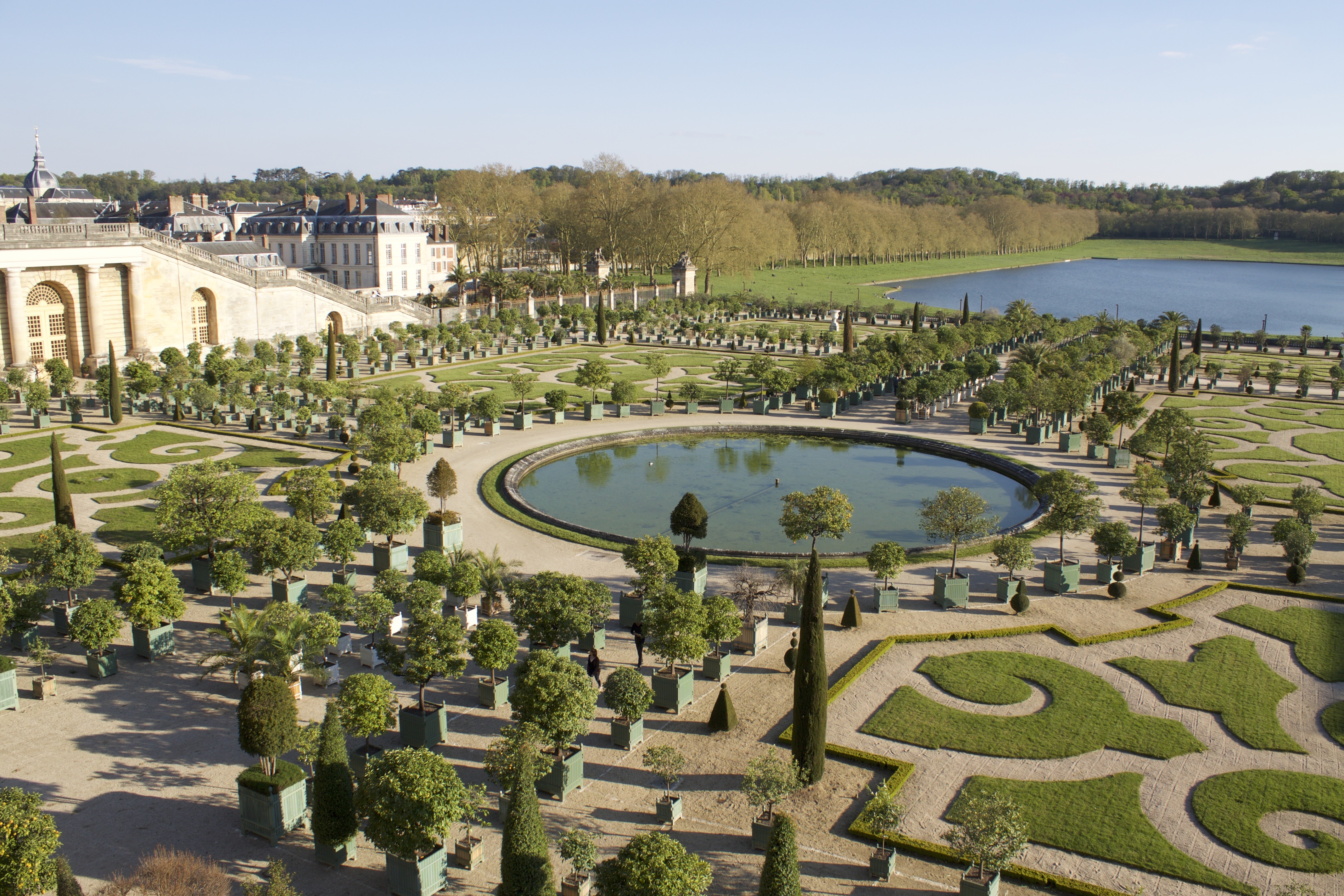 Versailles